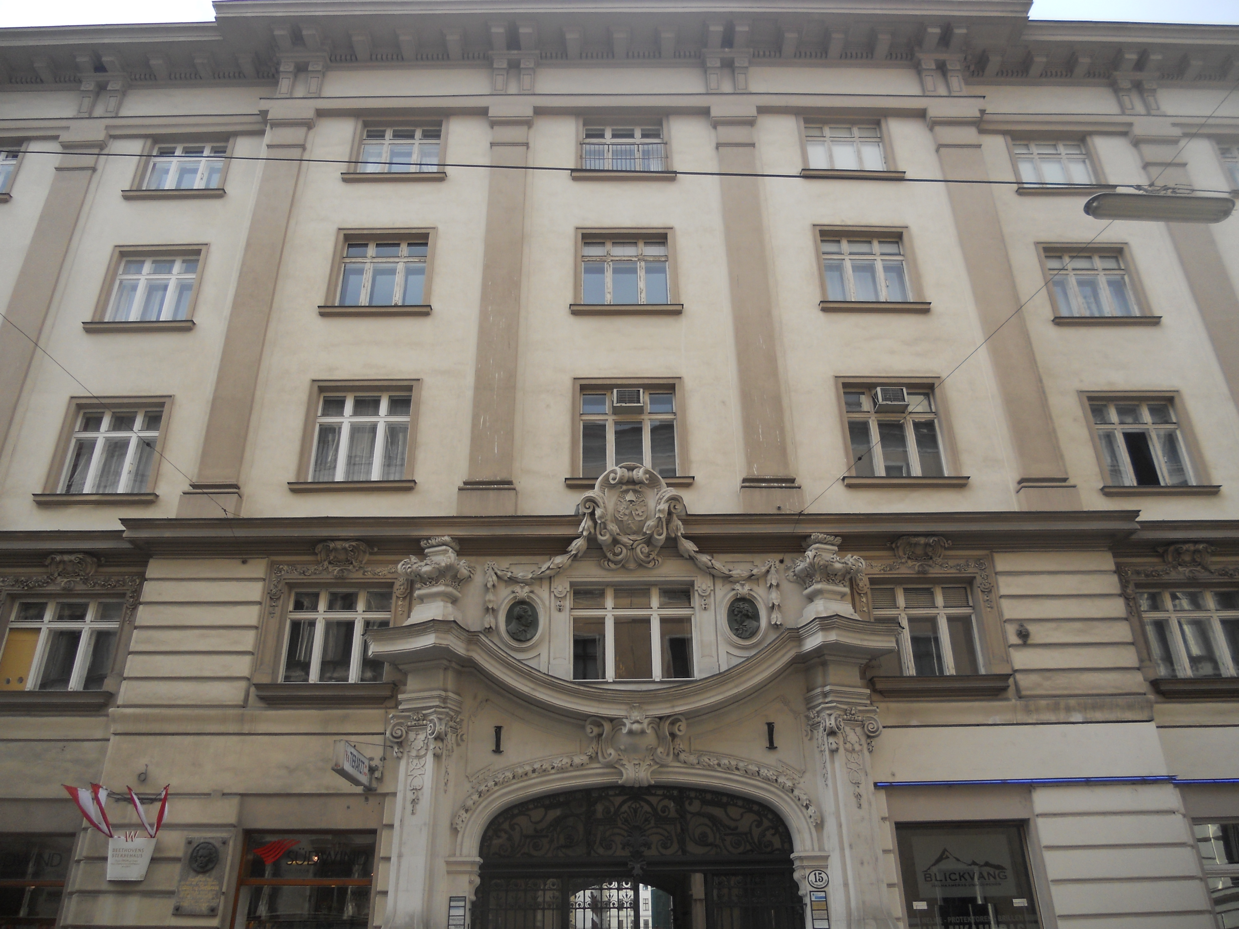 Miethaus, Schwarzspanierhaus